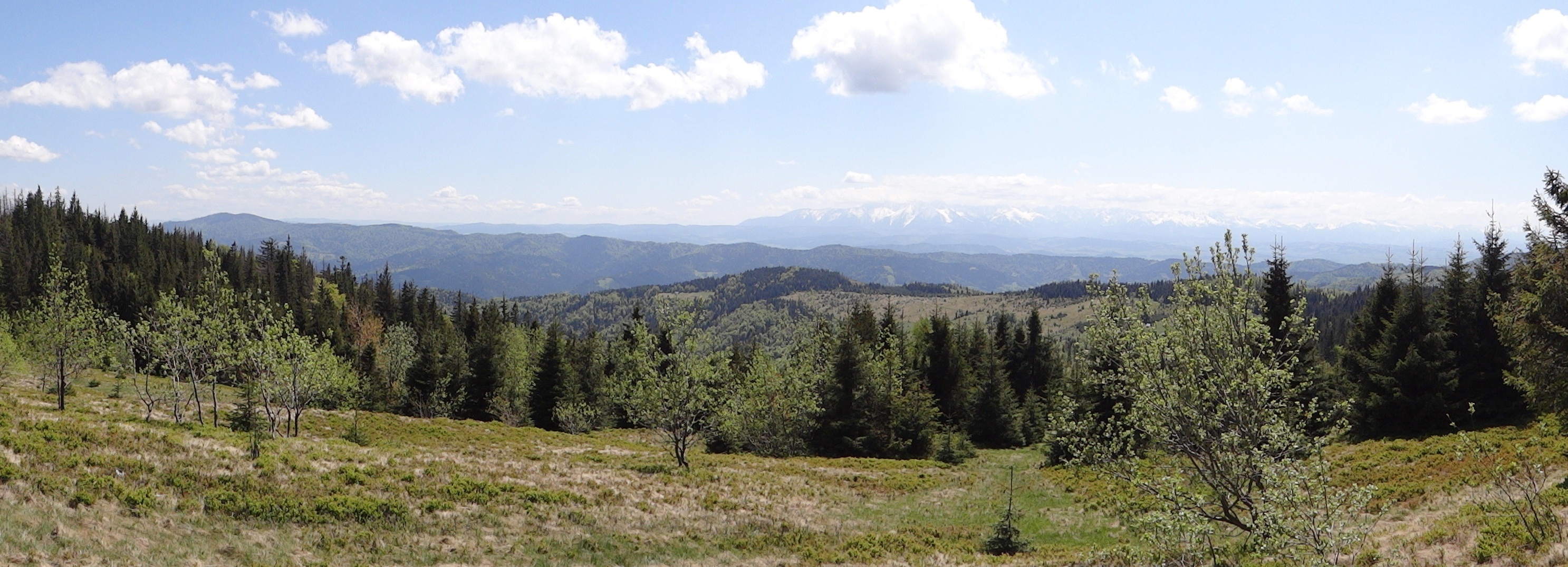 Panorama z Gorca Młynieńskiego na południe (dolina Potoku Gorcowego, Strzelowskie, Pasmo Lubaniua i Tatry)